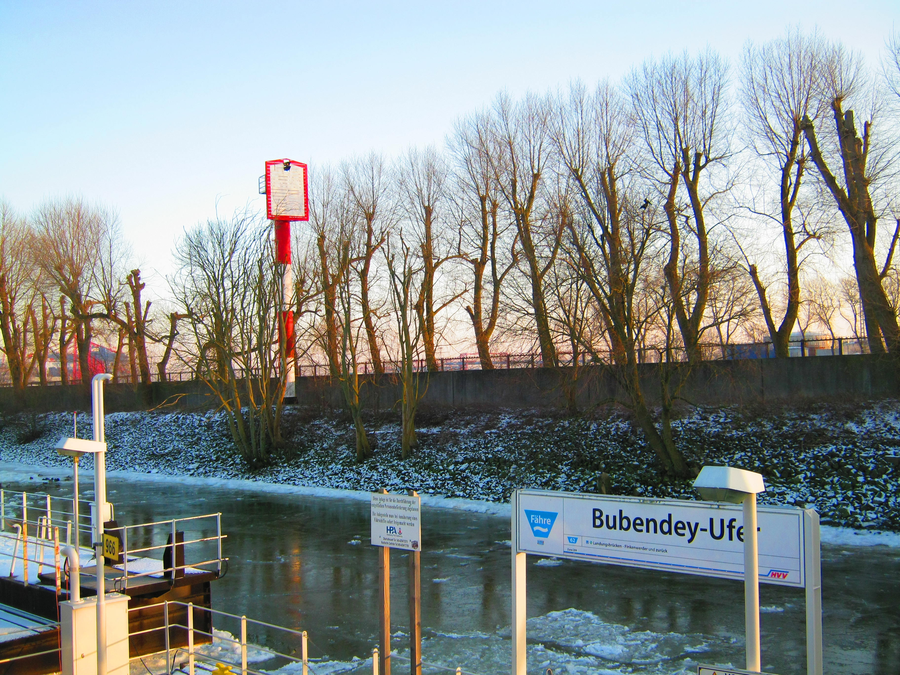 Leuchtturm, Unterfeuer, am Fähranleger Bubendey-Ufer in Hamburg-Finkenwerder.